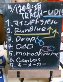 amiinaセトリボード(20150501(1))